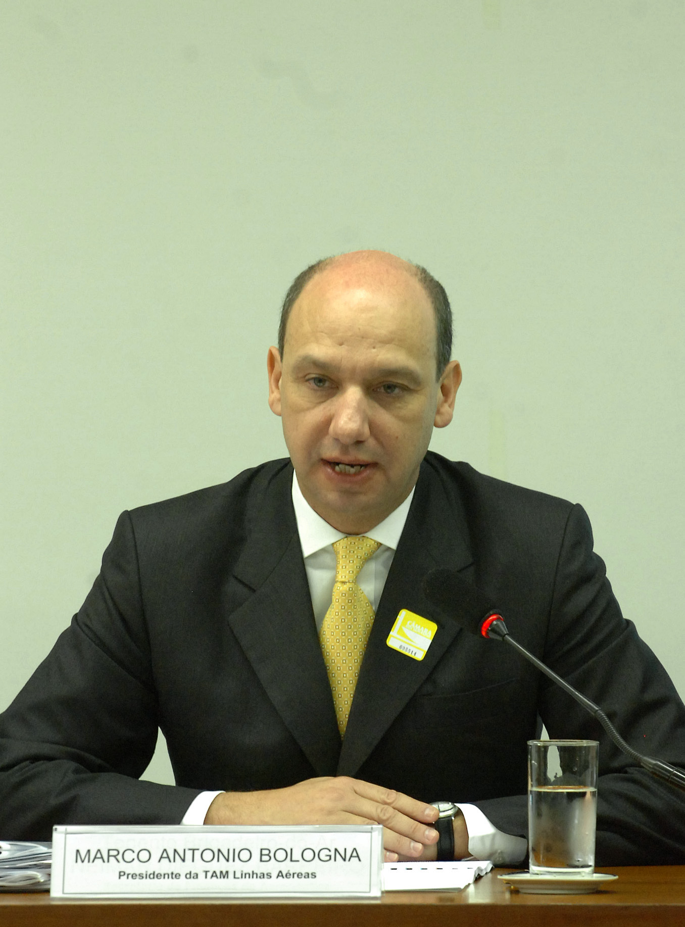 Marco Antonio Bologna é um executivo brasileiro, atual presidente da TAM Linhas Aéres.